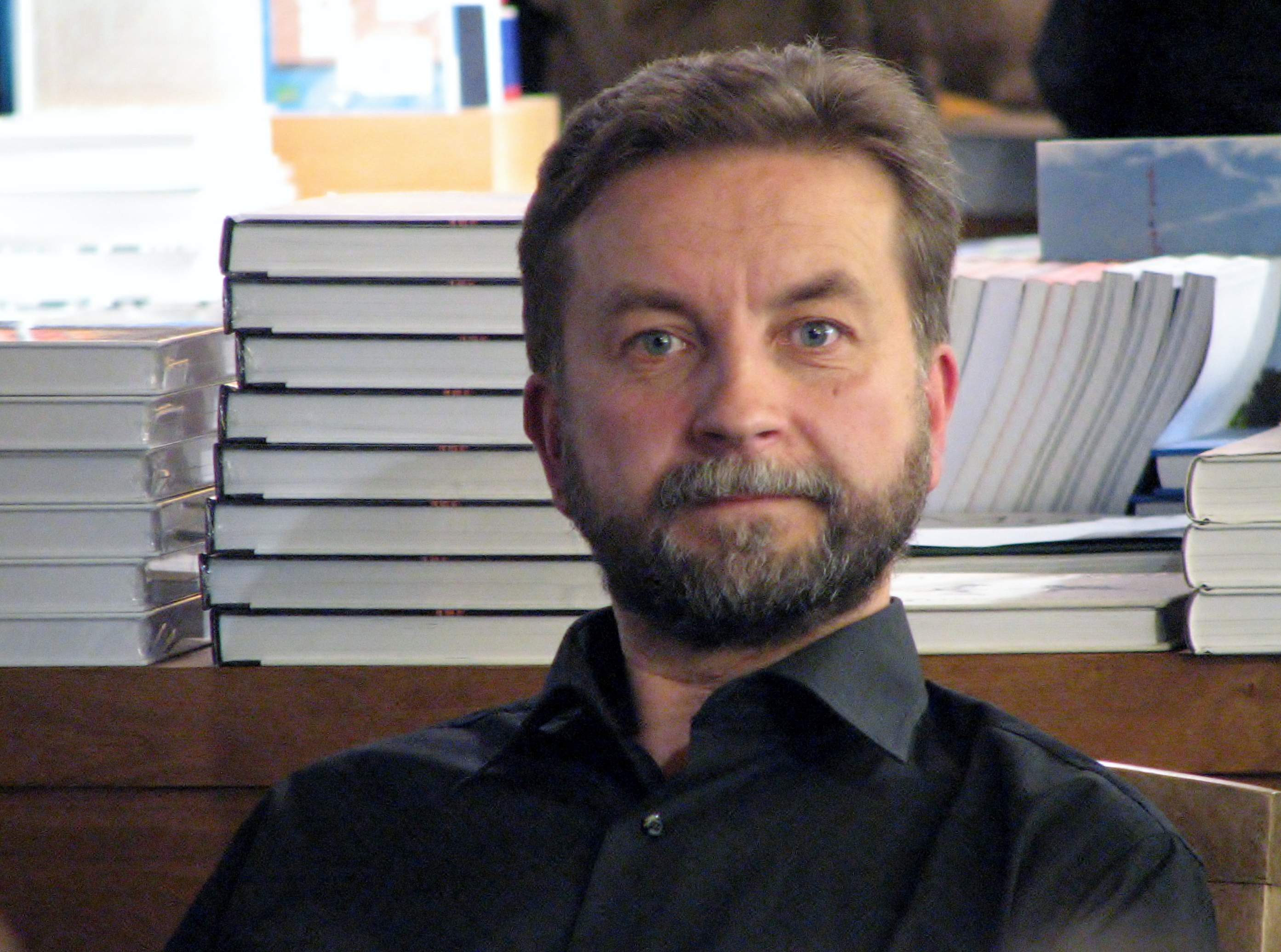 Hanno Ojalo raamatu "101 Eesti lahingut" esitlusel Rahva Raamatus